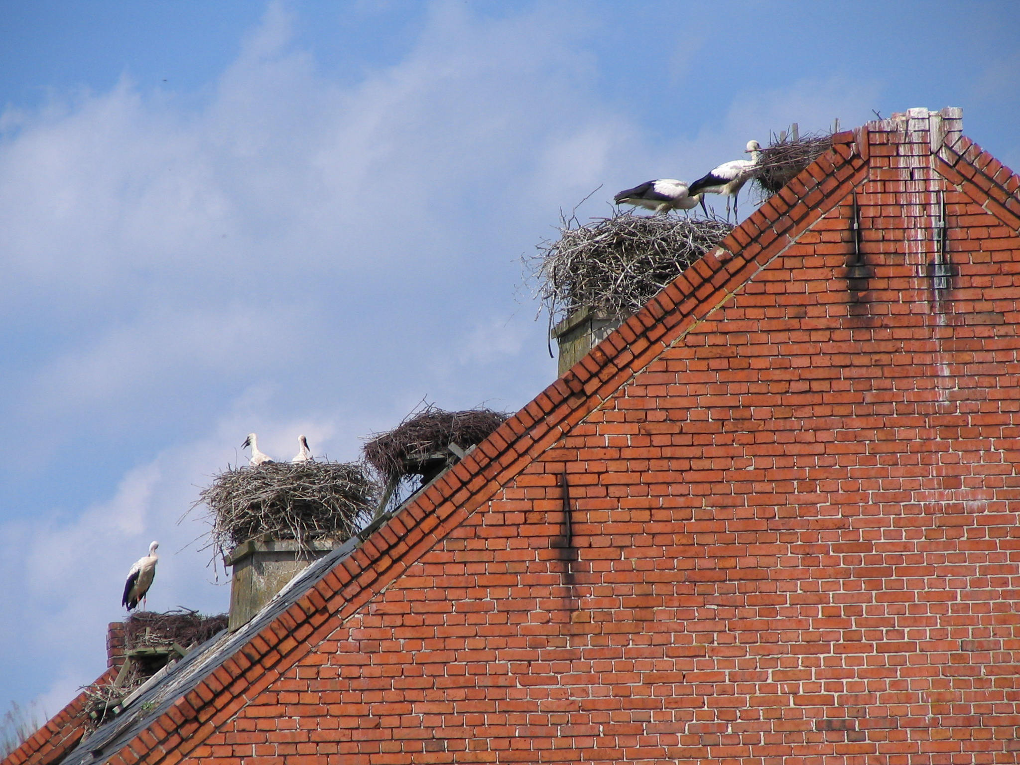 Scheunendach mit 5 Storchennestern in Rühstädt, Brandenburg, Deutschland